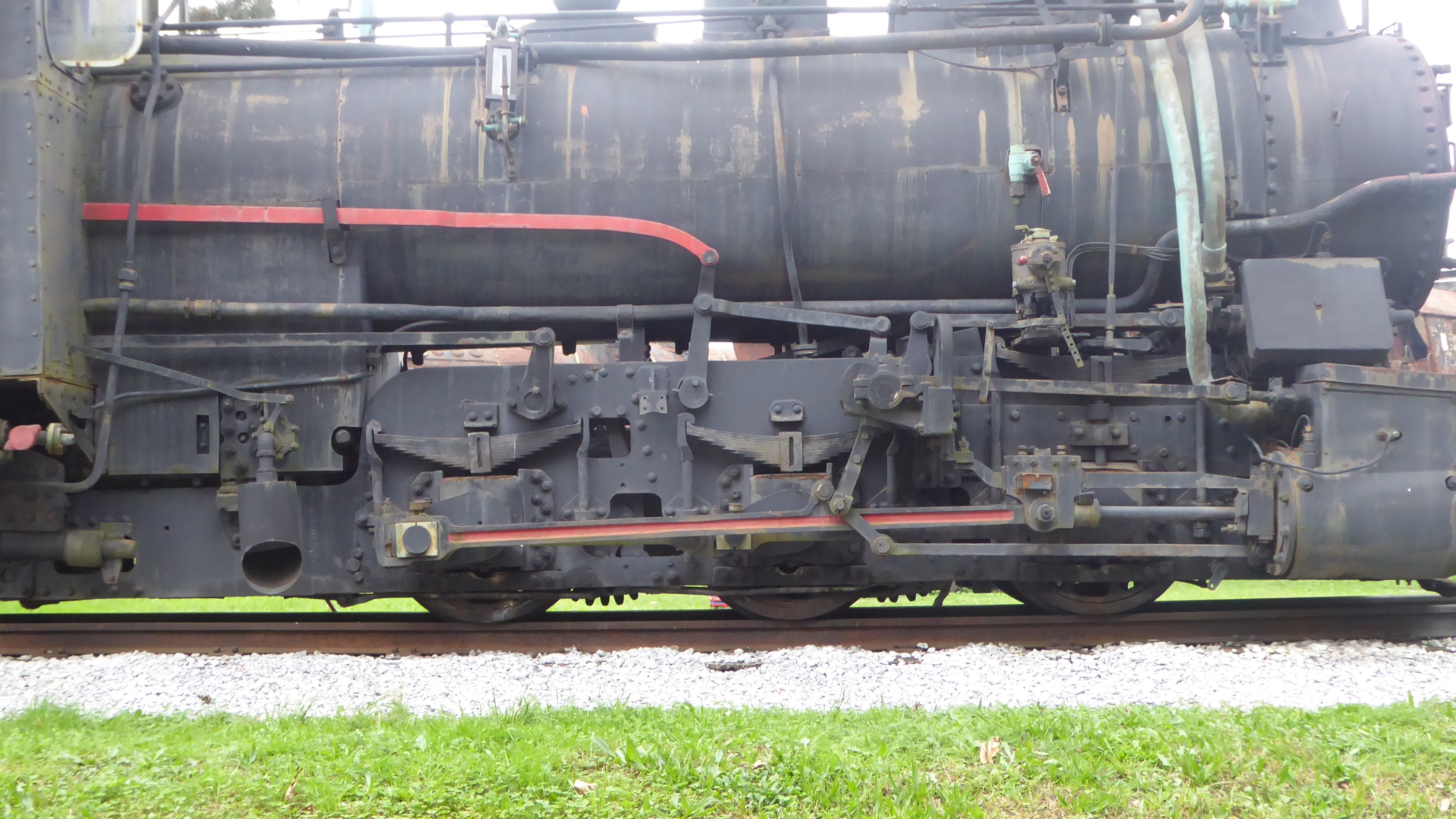 Lokomotive JŽ 97-025 im Eisenbahnmuseum Ljubljana Die Außenzylinder mit einfacher Dampfdehnung treiben die dritte Adhäsionsachse an, welche mit der ersten und zweiten Kuppelachse durch Kuppelstangen und Hallschen Kurbeln verbunden ist.